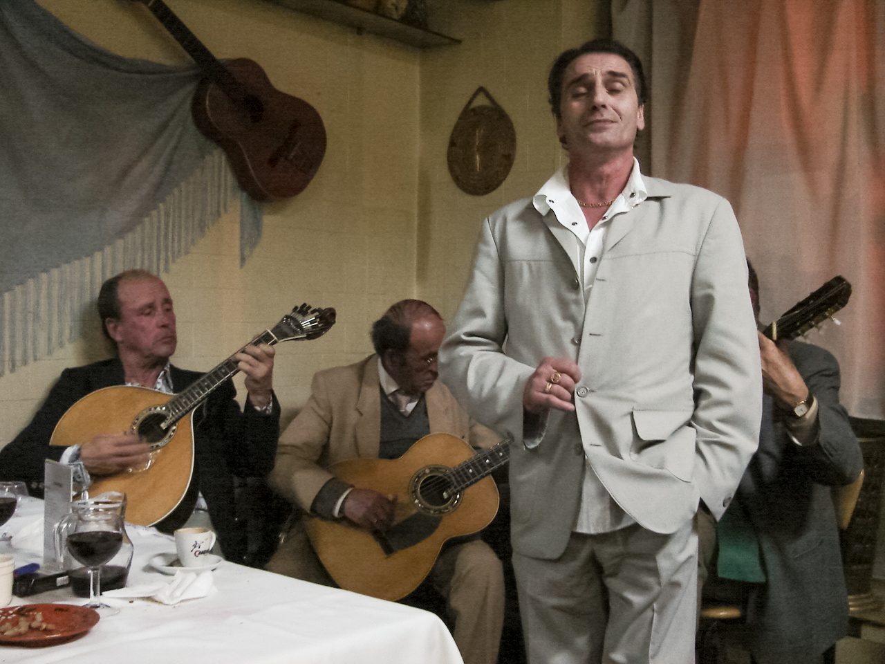 A fado singer in O Boteko, Rua Dom Manuel II, Porto, Portugal